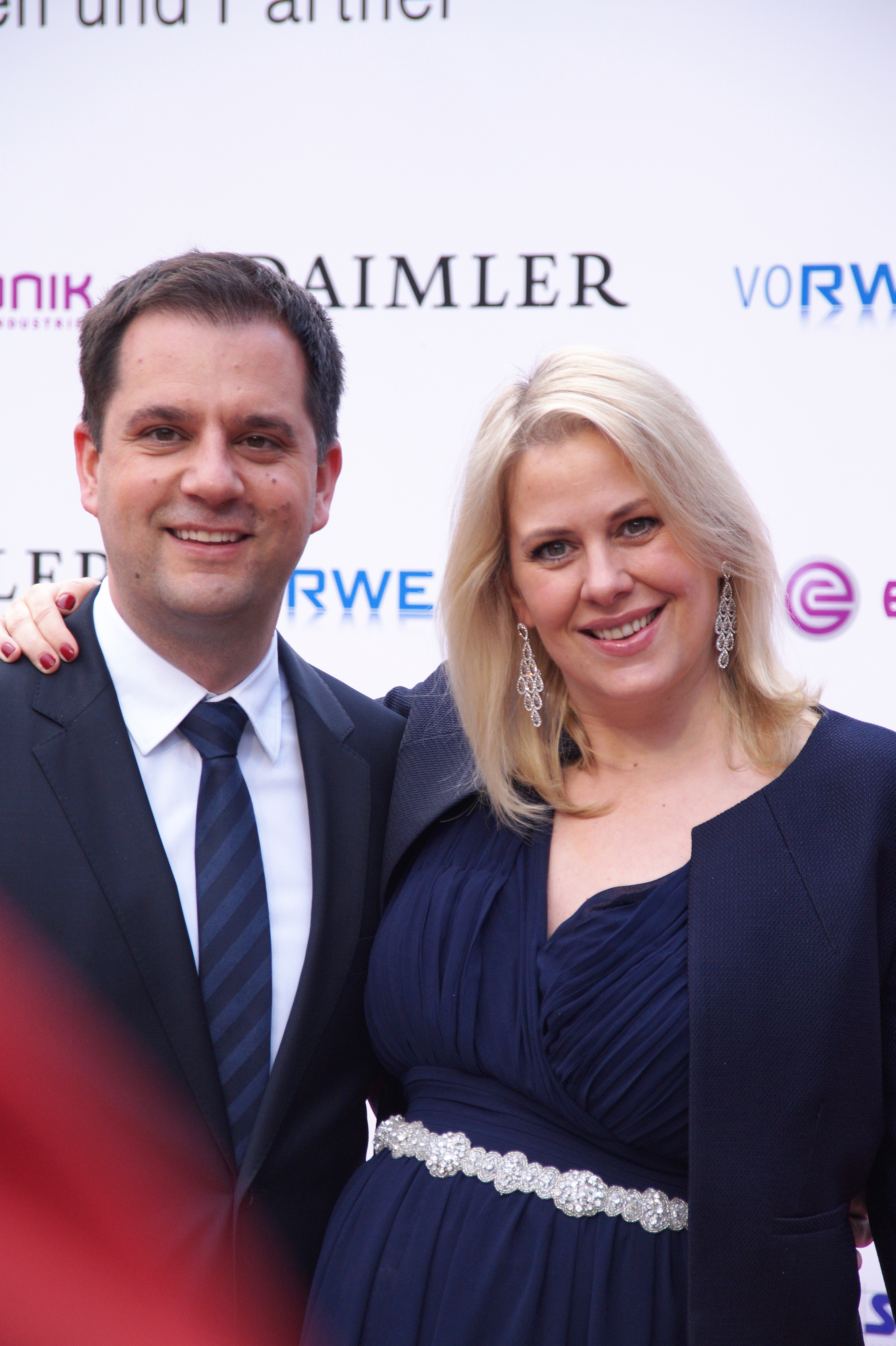 Anke Greifeneder bei der Verleihung des 'Grimme Preis 2016' am 08.04.2016 in Marl.